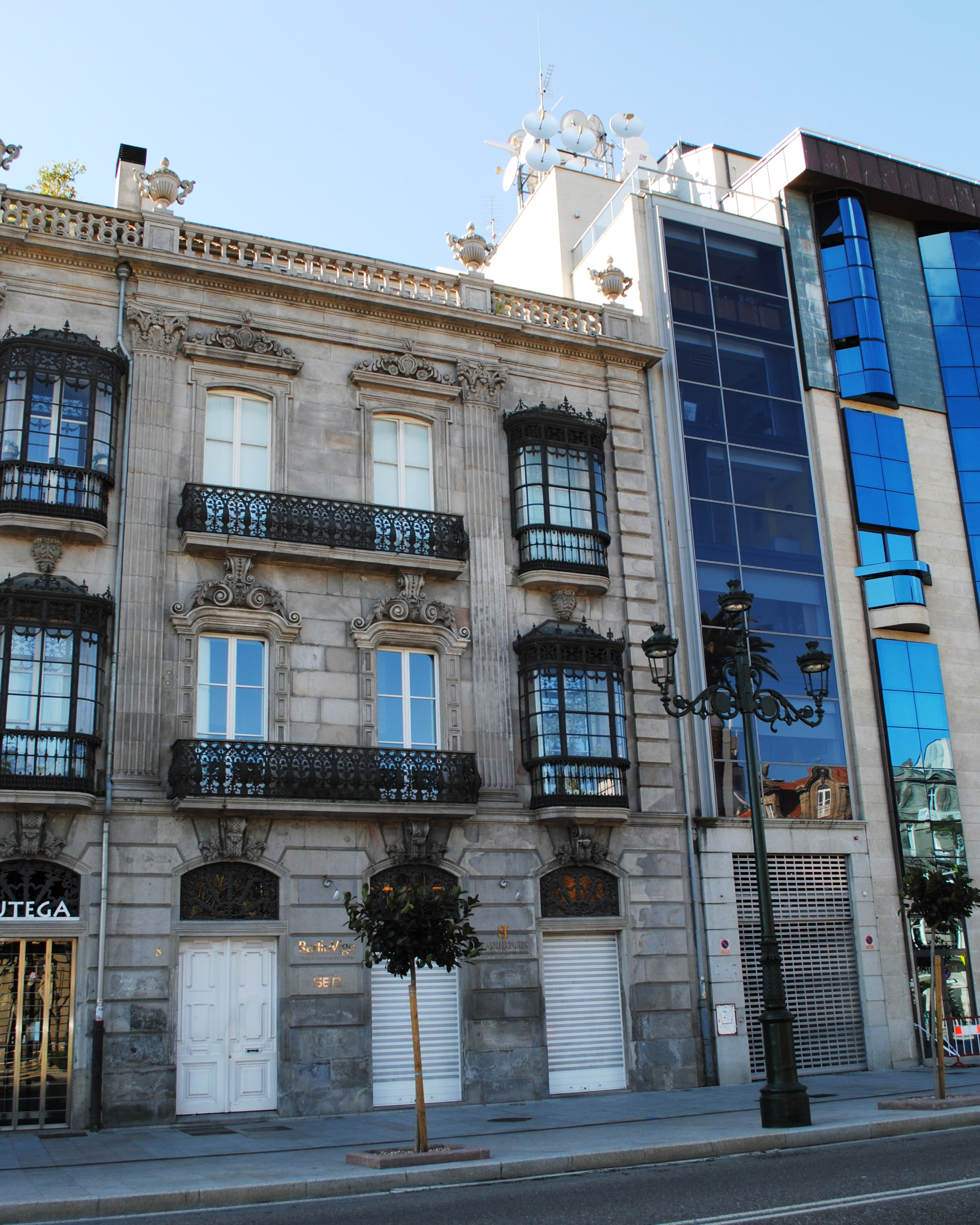 Vista parcial das Casas para Manuel Blanco García, 1878, do mestre de obras Alejandro Rodríguez Sesmero. Sede de Radio Vigo e Localia Vigo, rúa Areal 8.